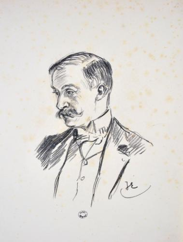 Portrait du gouverneur d'Algérie Paul-Amédée Revoil (1856-1914)